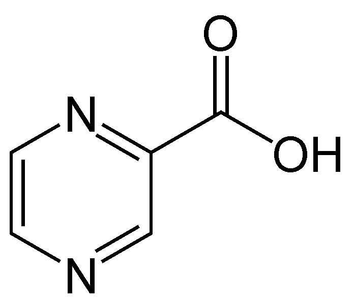 pyrazinoic acid, Pyrazincarbonsäure